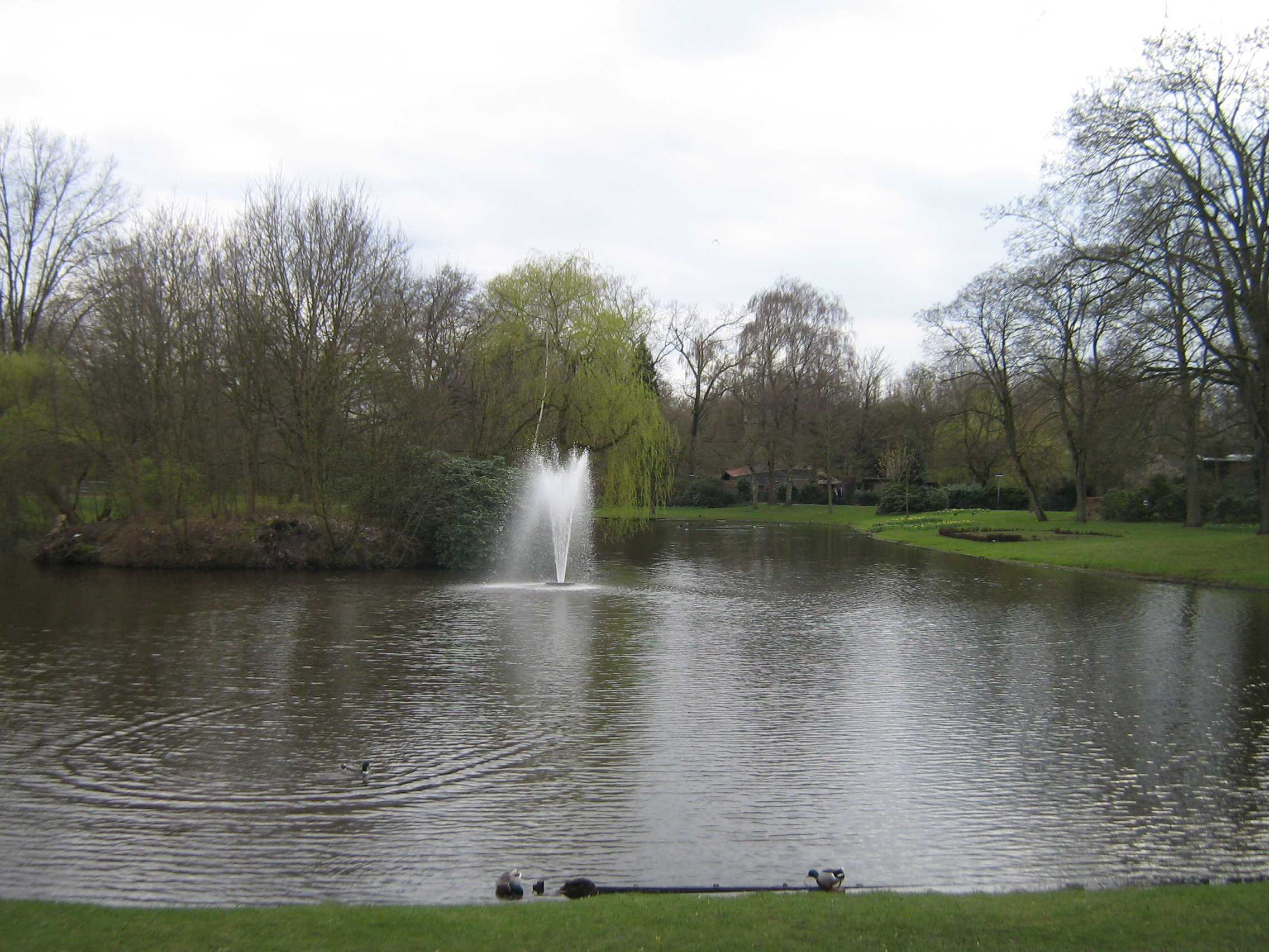 Stadtpark in Gronau/Westf.